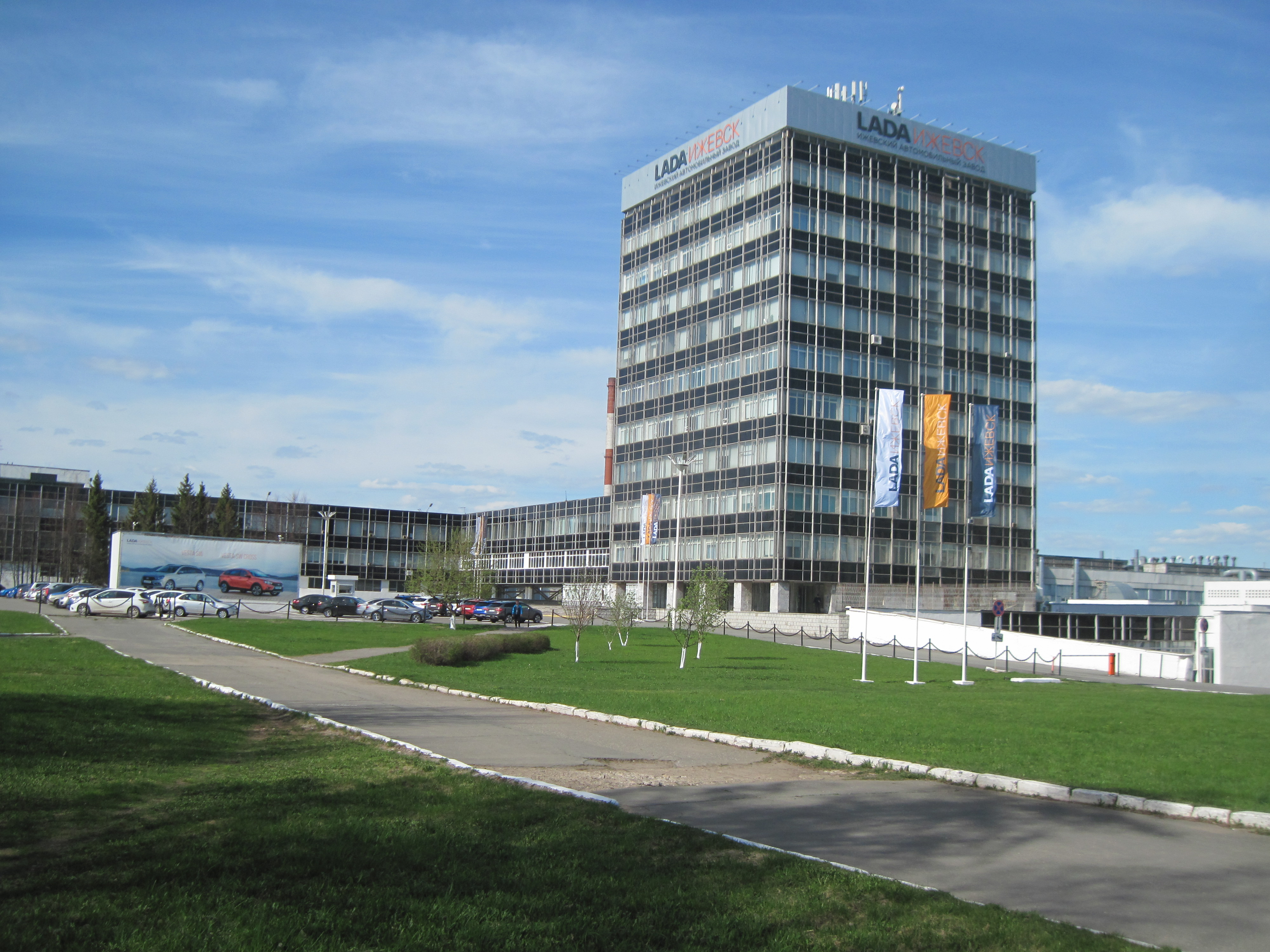 Ижевский автозавод,административный корпус.